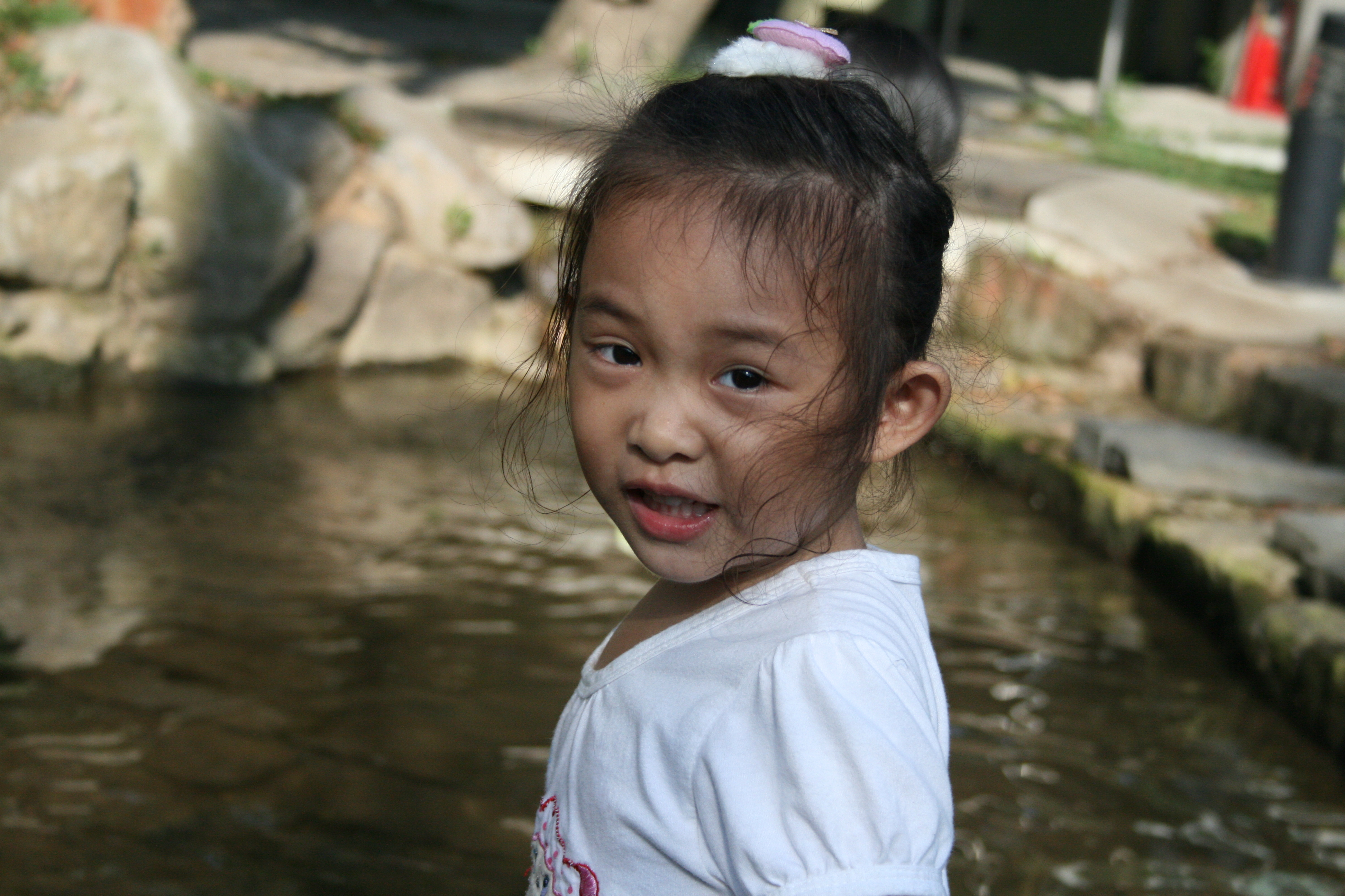 中文（台灣）: 小孩的回眸一笑